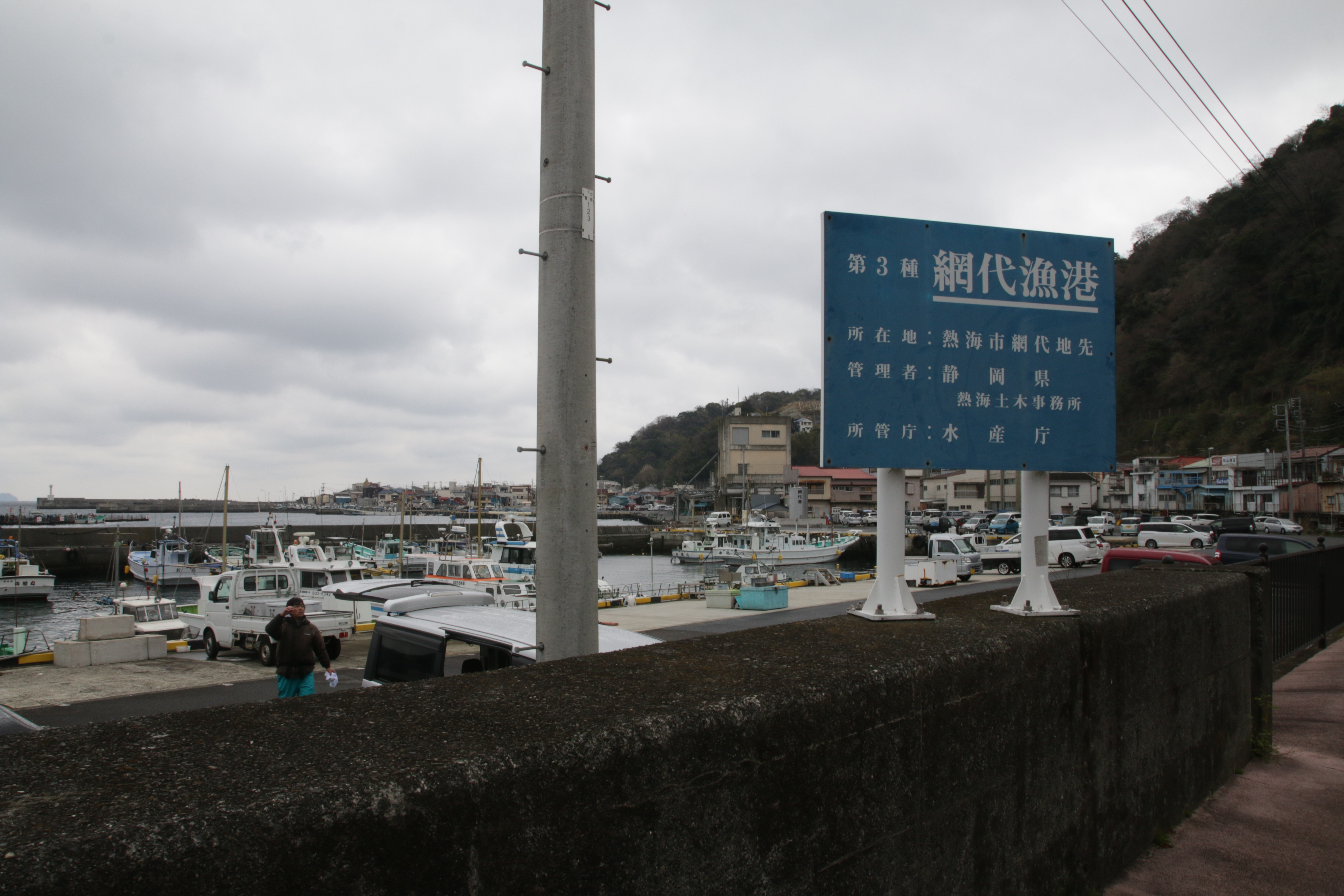 網代漁港の様子Canon EOS 70D